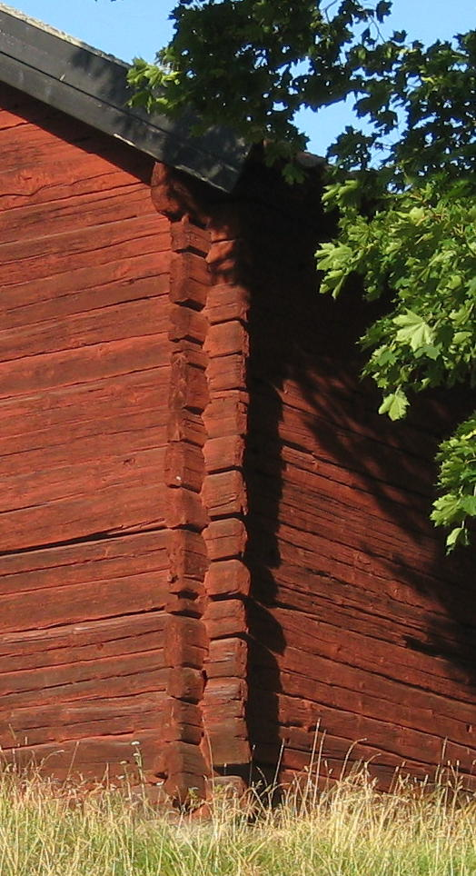 Fatburen vid Ängby slott i Norra Ängby i Bromma. Fatburen är en gammal förrådsbyggnad, som ligger på höjden till höger om slottet och uppfördes på 1690-talet. Den anses vara Stockholms äldsta träbyggnad. Närbild av hörnknuten, den s.k. "knutkedjan" med knutformen, s.k. "vertikal enkelkatt".